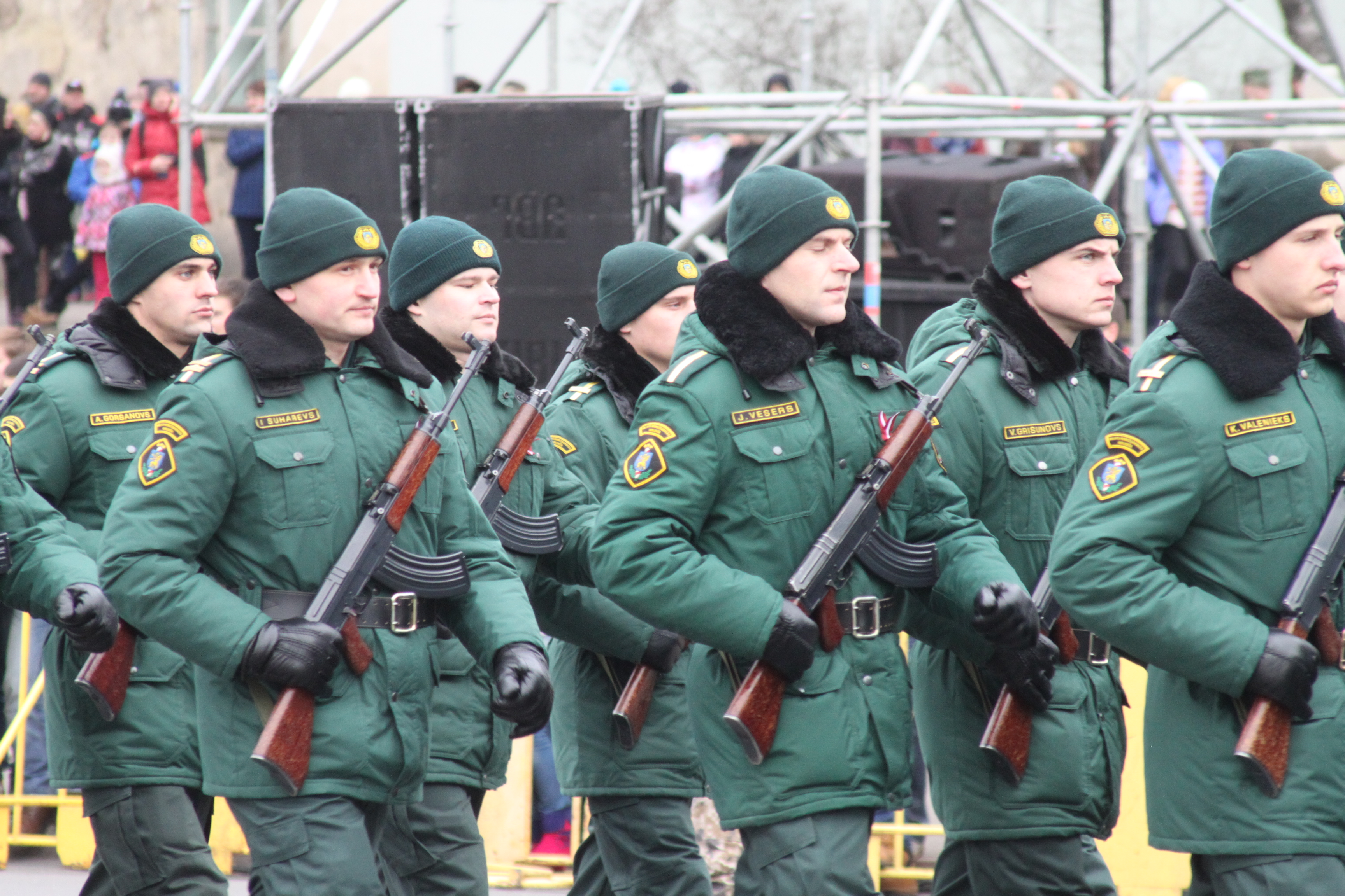 Latvian Independence Day military parade 155